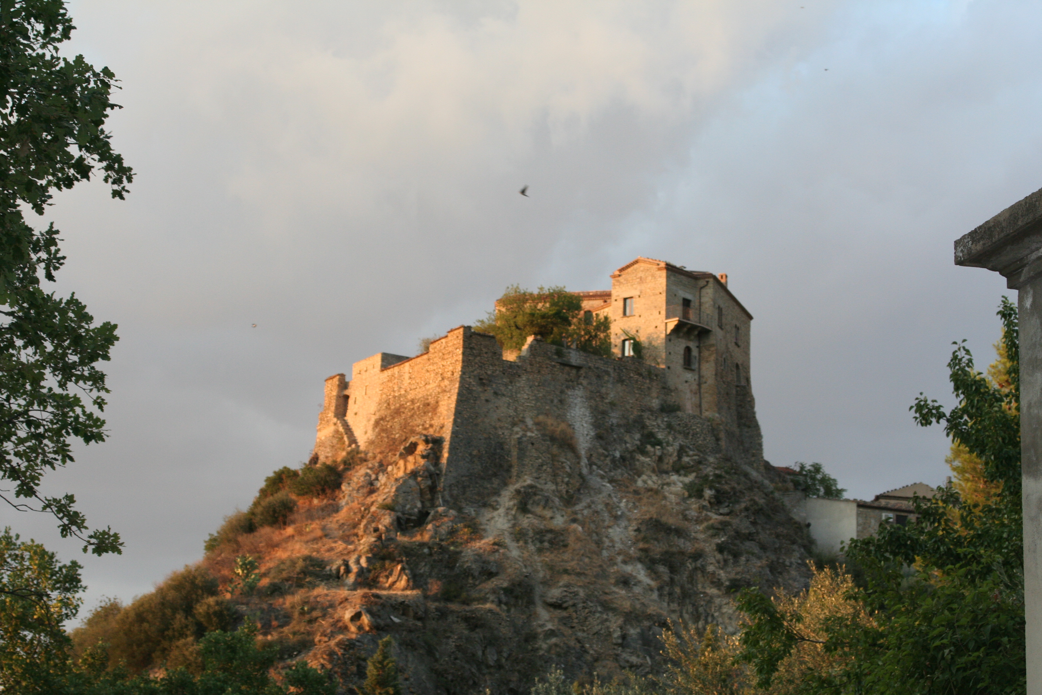 Autore: Rocco Stasi Fonte: fatta da me Licenza d'uso: GFDL, sono l'autore